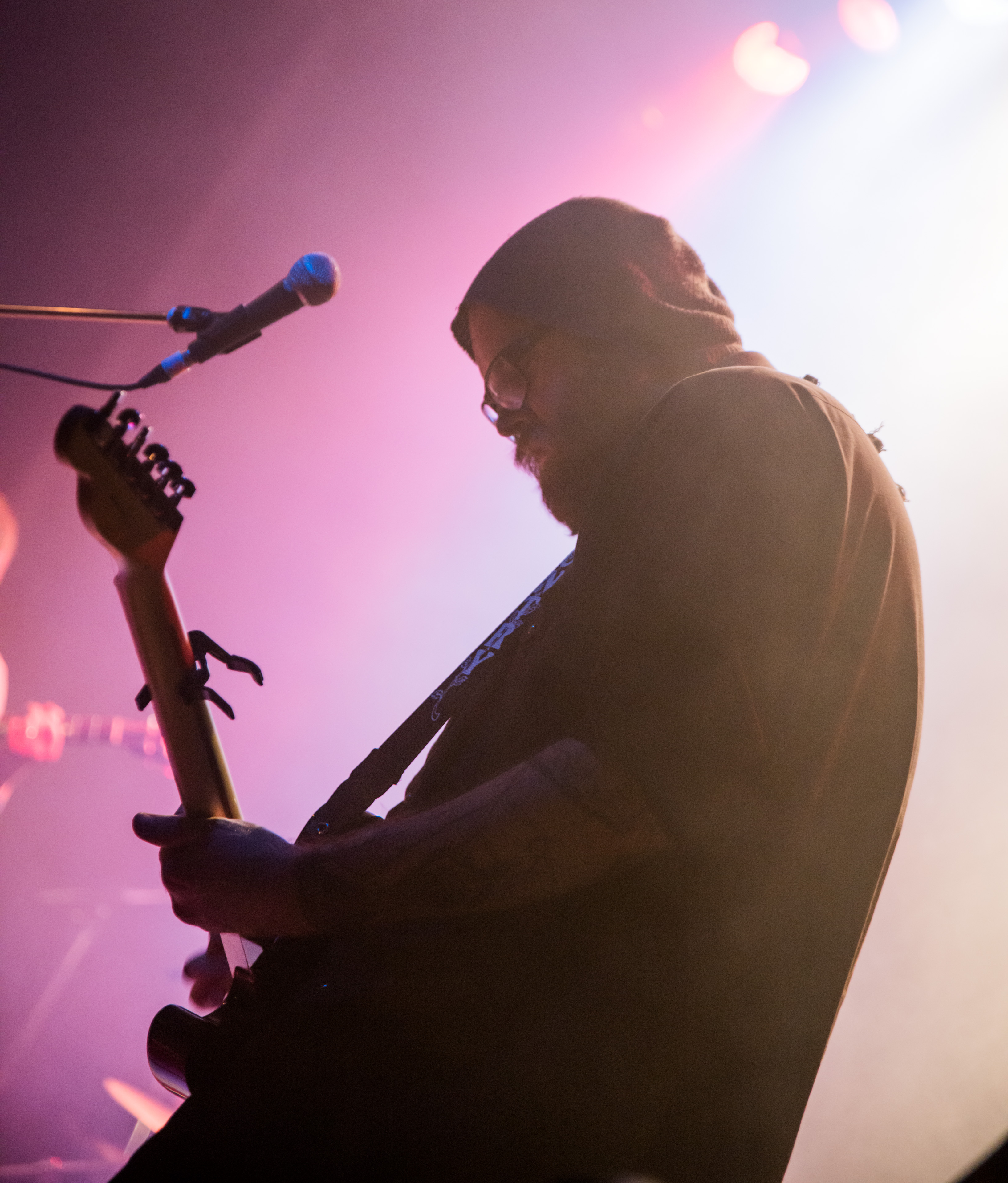 de The Builders and Butchers 2014 Muenchen Kranhalle